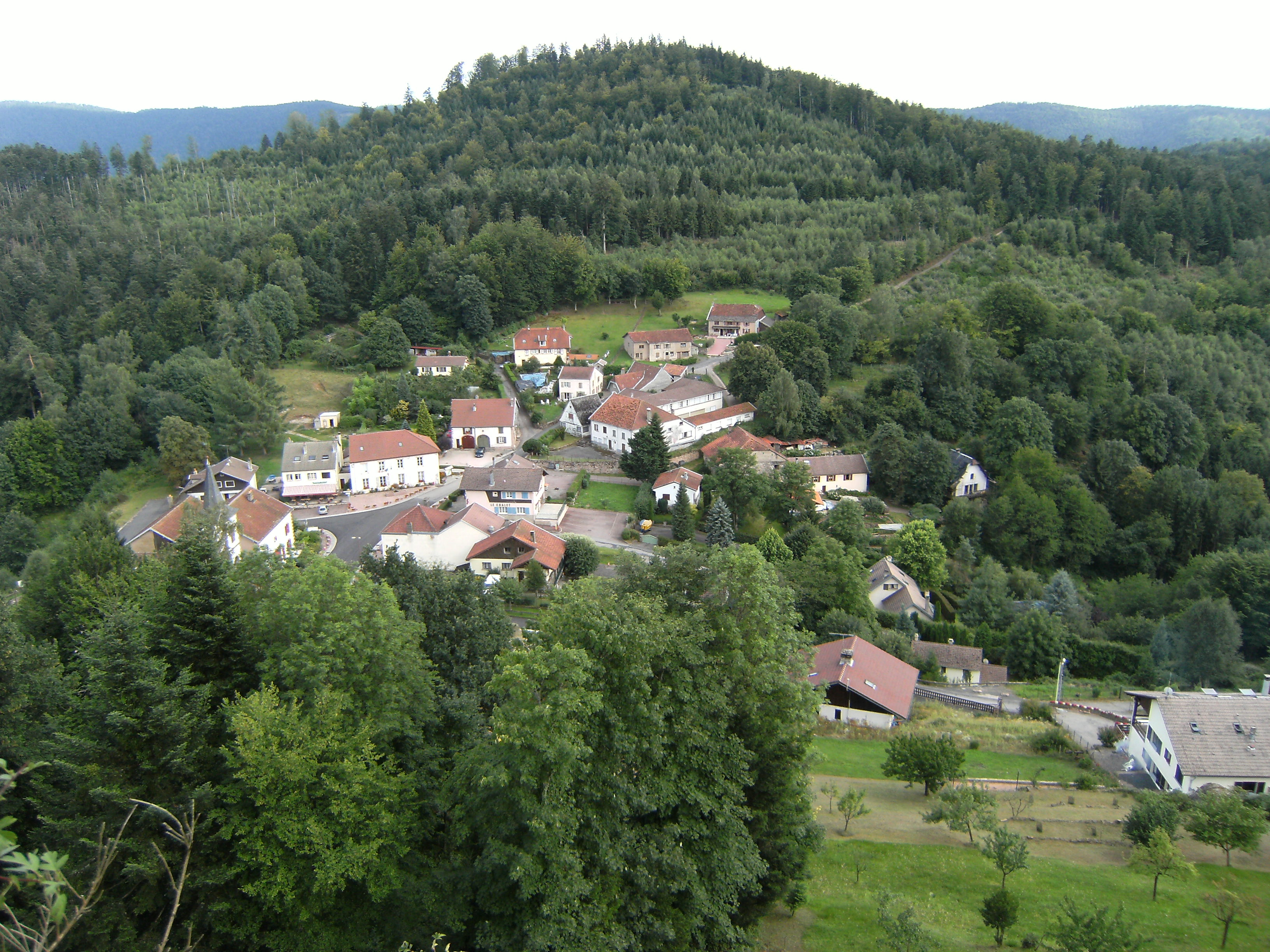 Village de Pierre-Percée vu depuis le château